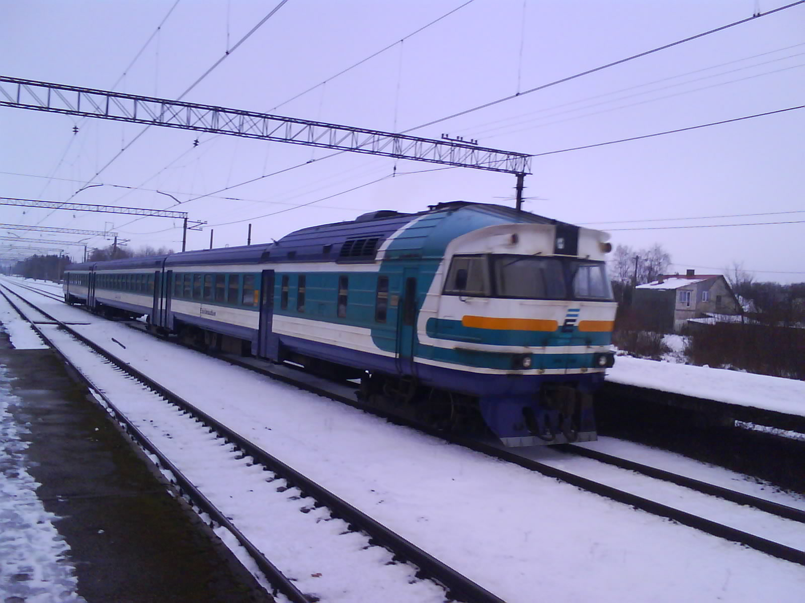 Pilt Edelaraudteed rongist